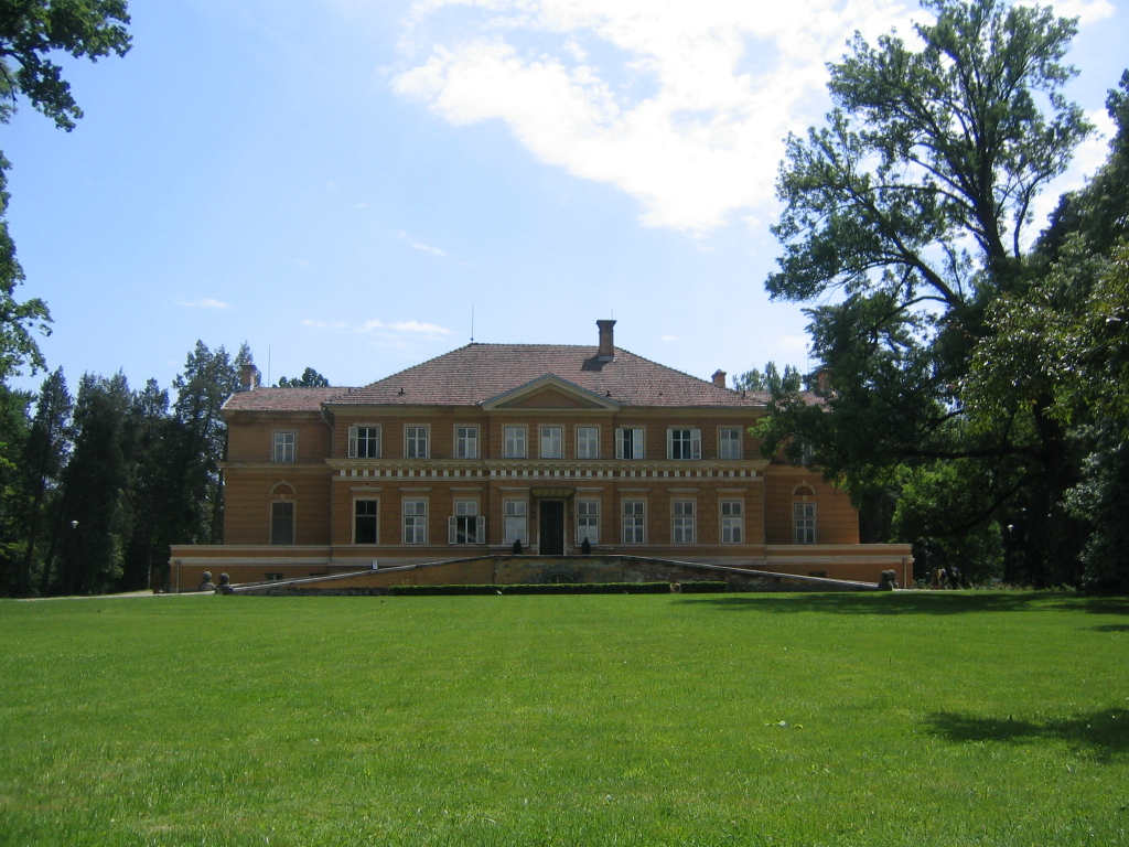 Castelul Regal de la Savarsin